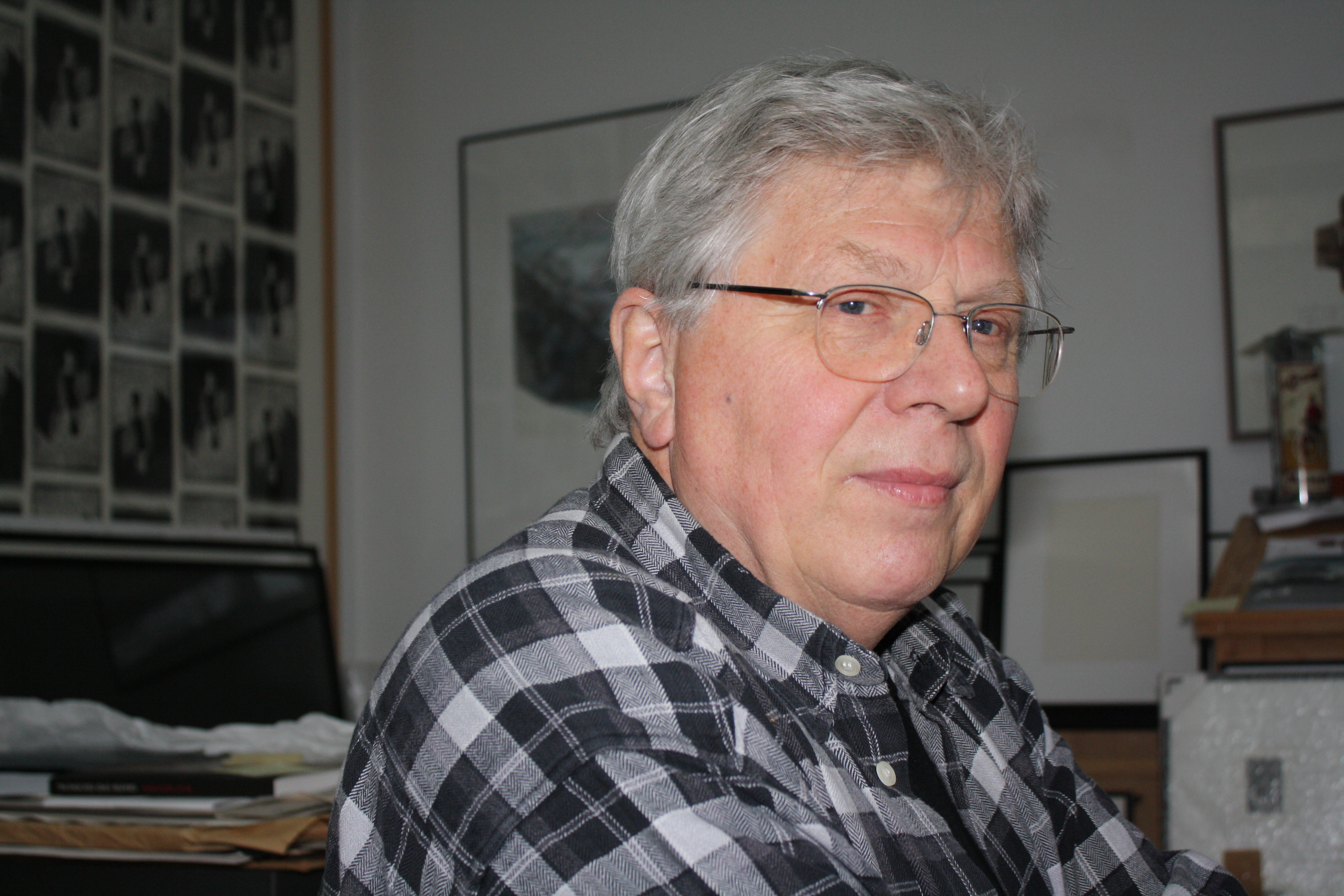 Foto Rolf Münzner